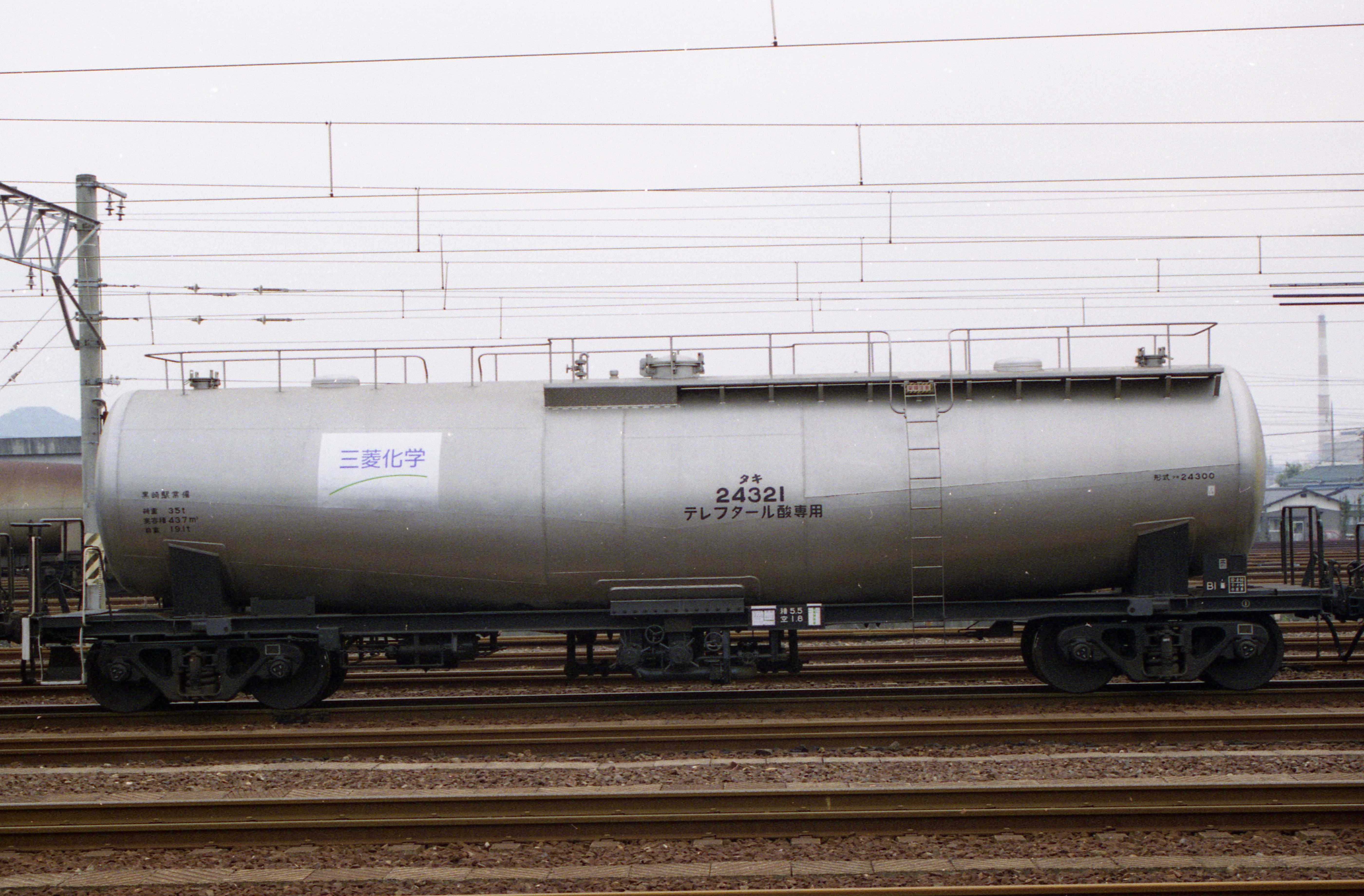 国鉄タキ24300形タキ24321。三菱化学所有。1995年5月3日、新南陽駅にて。